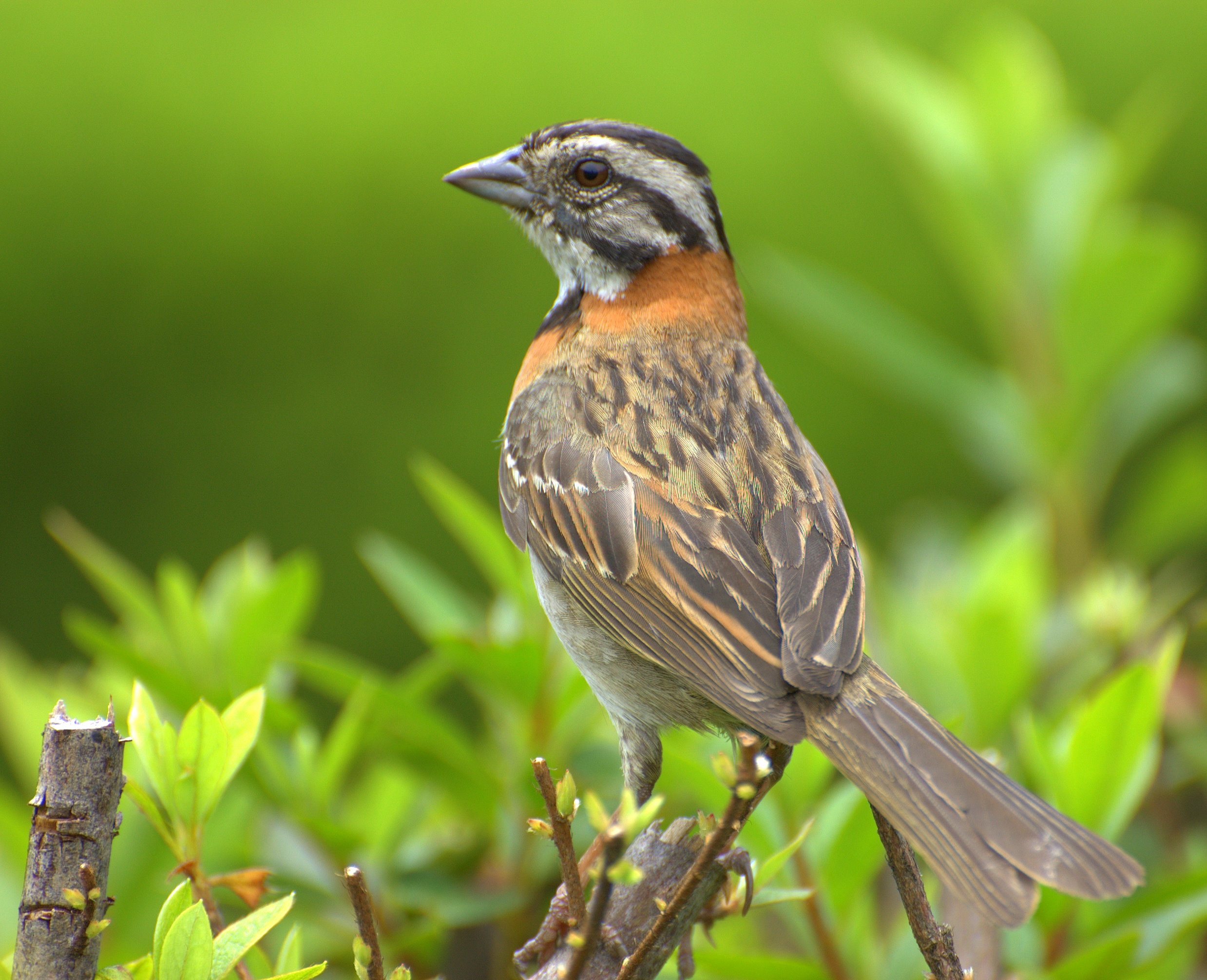 (Zonotrichia capensis) Parque da Independência, Museu do Ipiranga, São Paulo